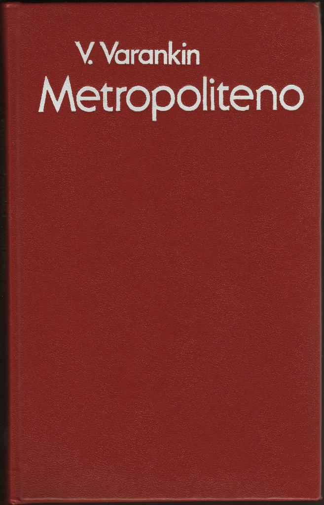 La kovrilpaĝo de Metropoliteno de Vladimir Varankin, eldono de la eldonejo “Progreso”, 1992. La malĝustaj kolorniveloj de la originala skano estas iomete pliĝustigitaj: 16 al la flavo en GIMP.